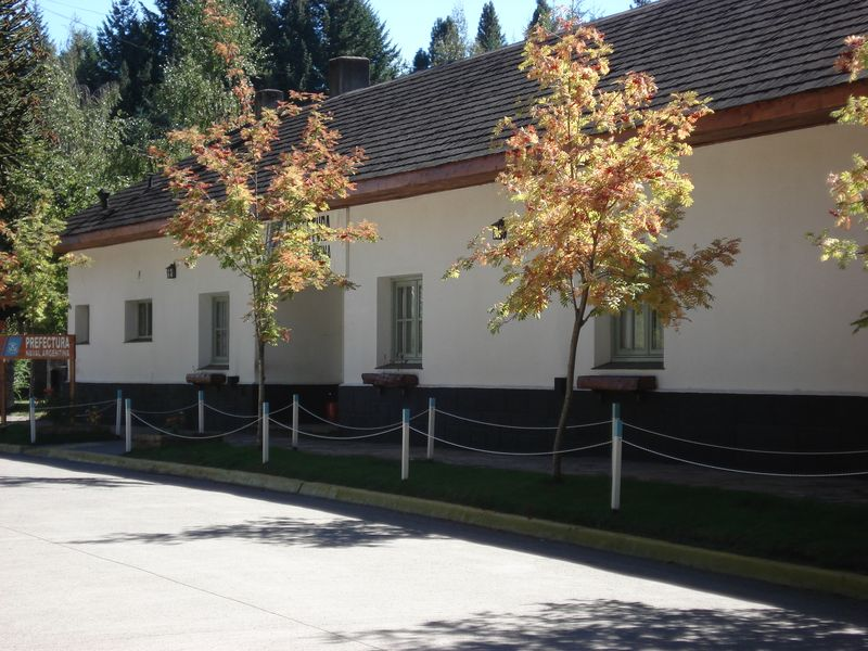 Sede la de Prefectura Naval Argentina y ex edificio de Correos y Telégrafos, donde se realizó la fundación de la localidad de Villa La Angostura.